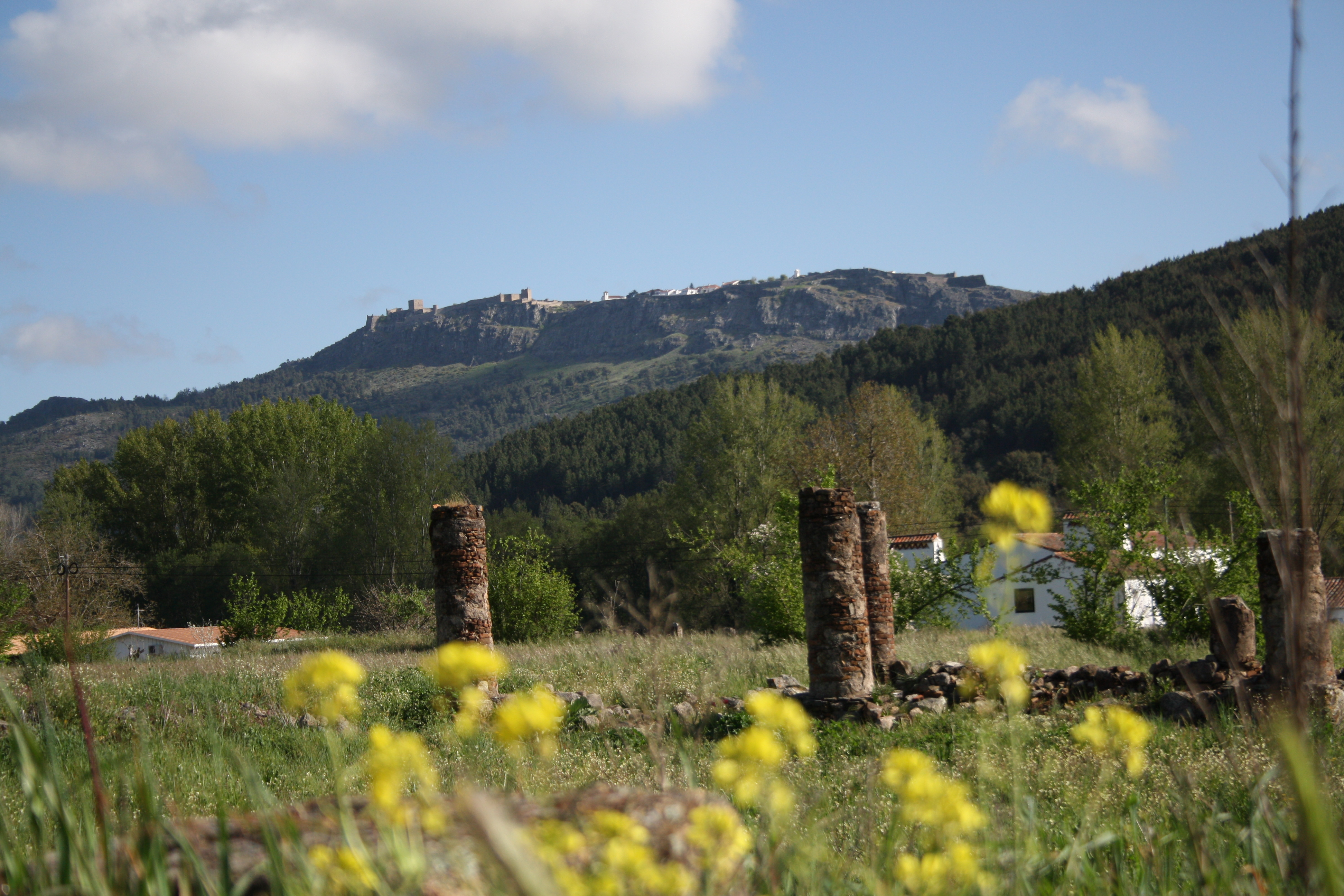 Perspectiva de Marvão, da cidade romana de Ammaia; Área Protegida da Serra de S. Mamede This is a photography of a Site of Community Importance in Portugal with the ID: PTCON0007. Natura2000 entry, EEA entry